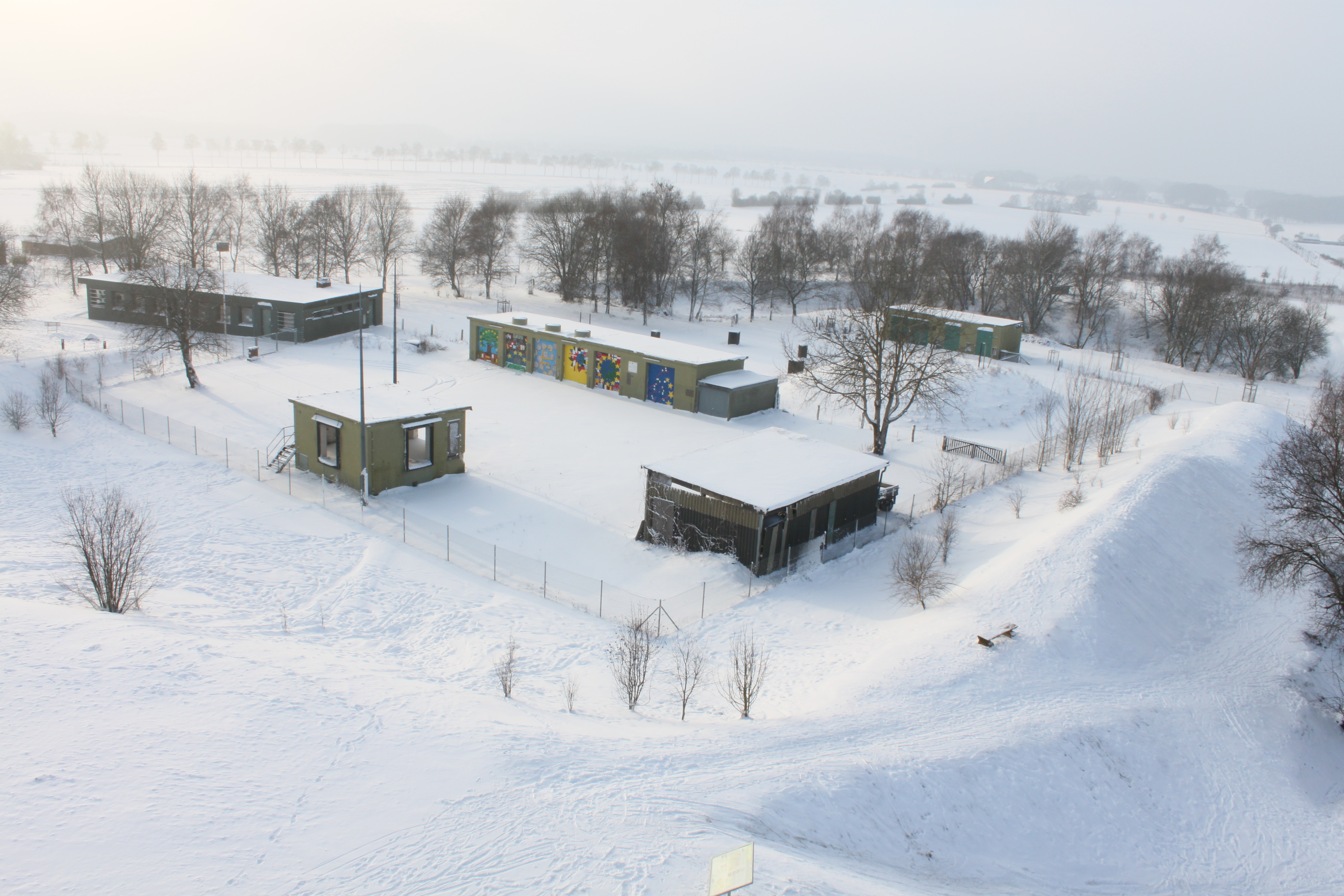 Hoher Berg Syke-Riestedt im Winter; Bilck vom Aussichtsturm nach Norden